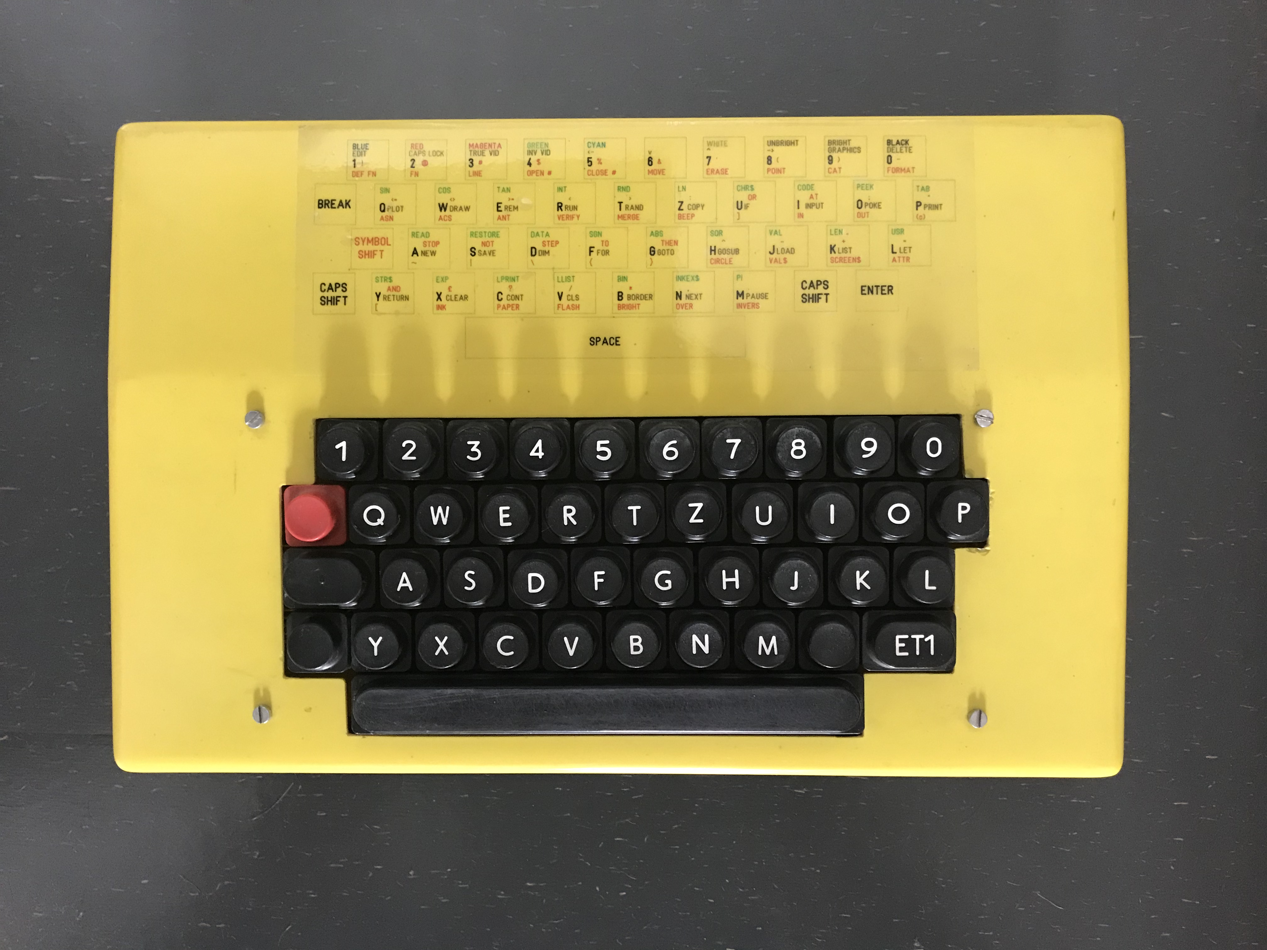 HCX aus Kleinserien die nicht im SKET Magdeburg hergestellt wurde